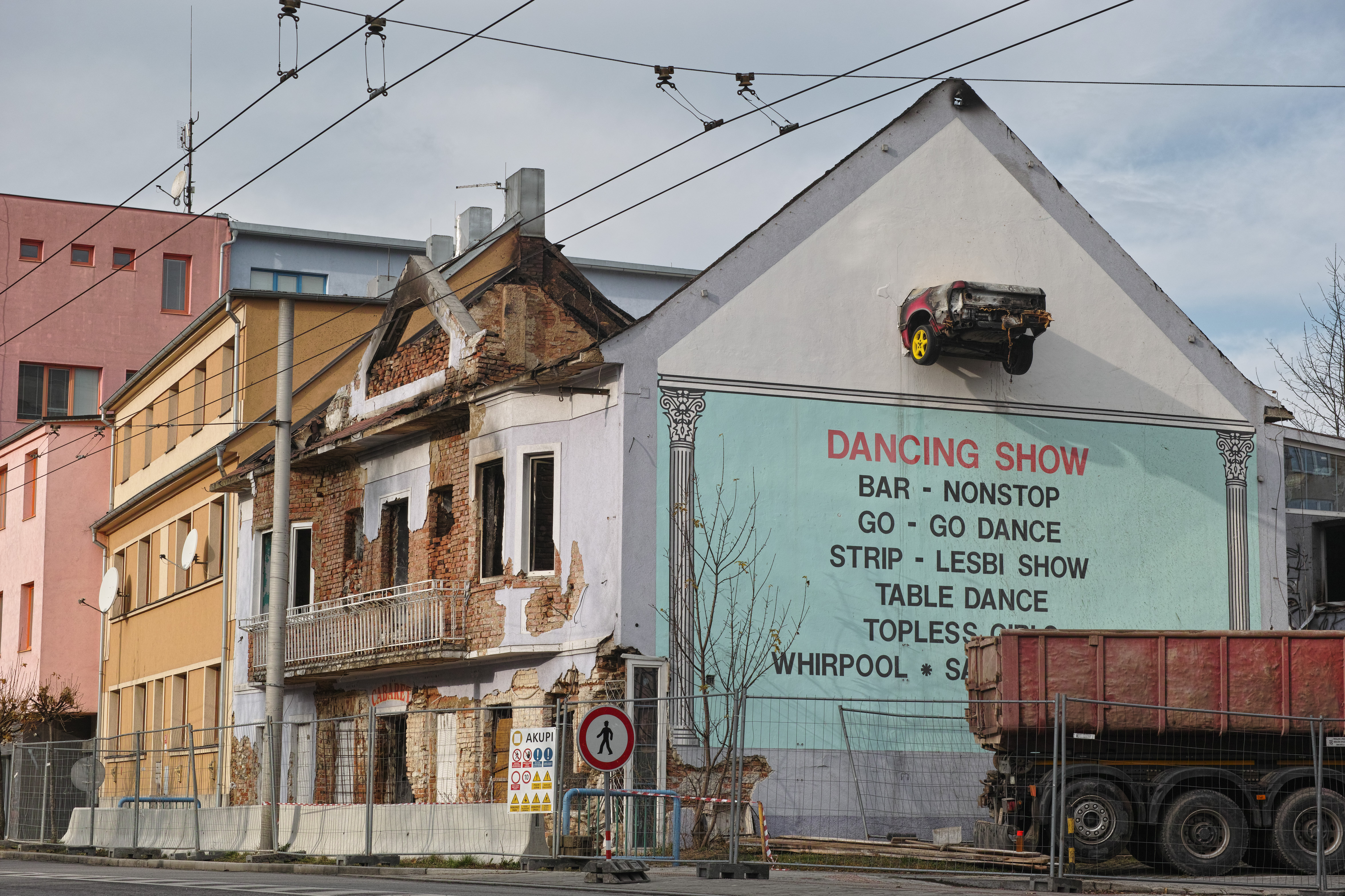 Kabaret Happy po posledním požáru.